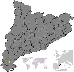 Localització de Tortosa. Location of Tortosa in Catalonia.